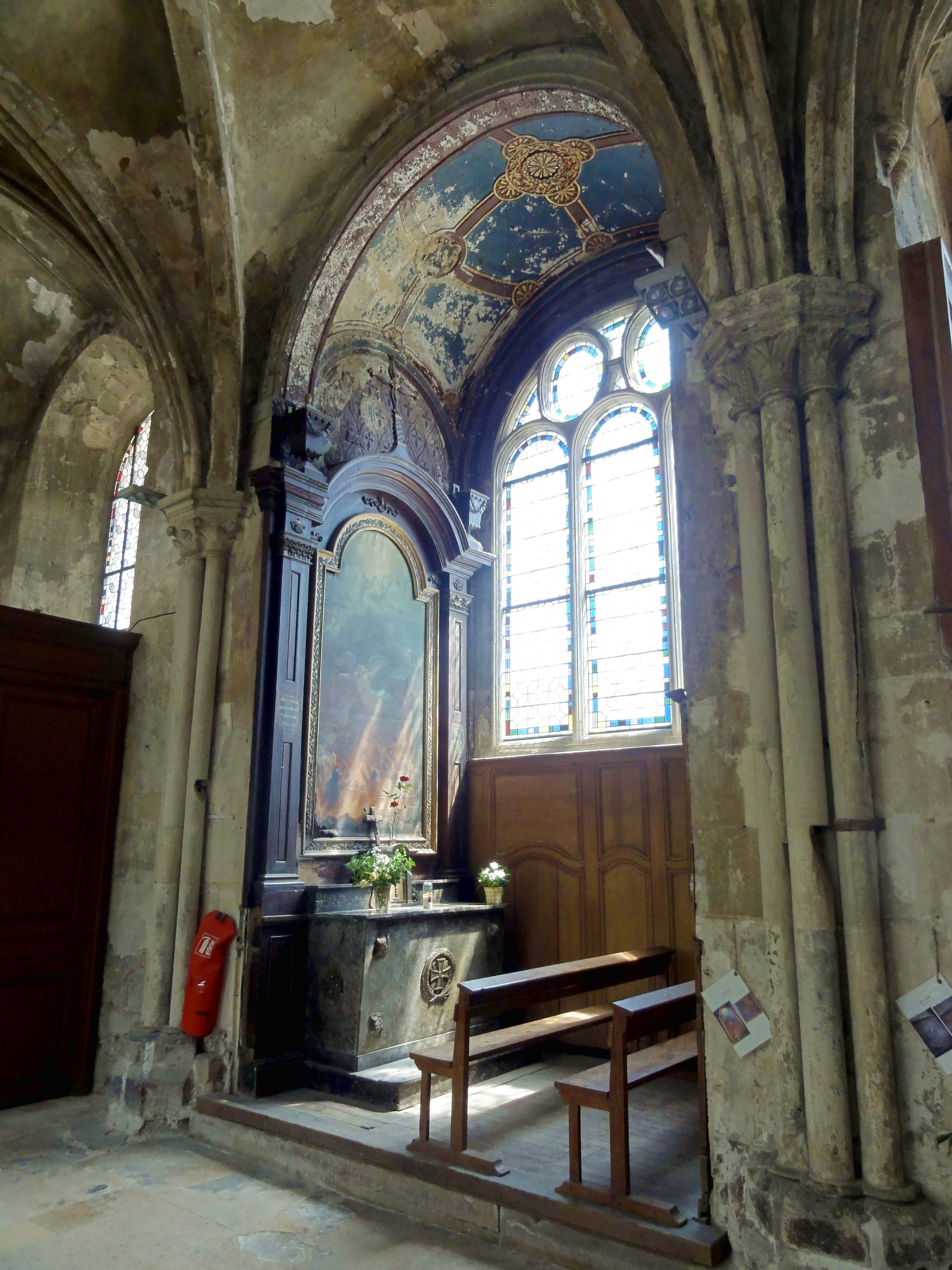 Voir titre.